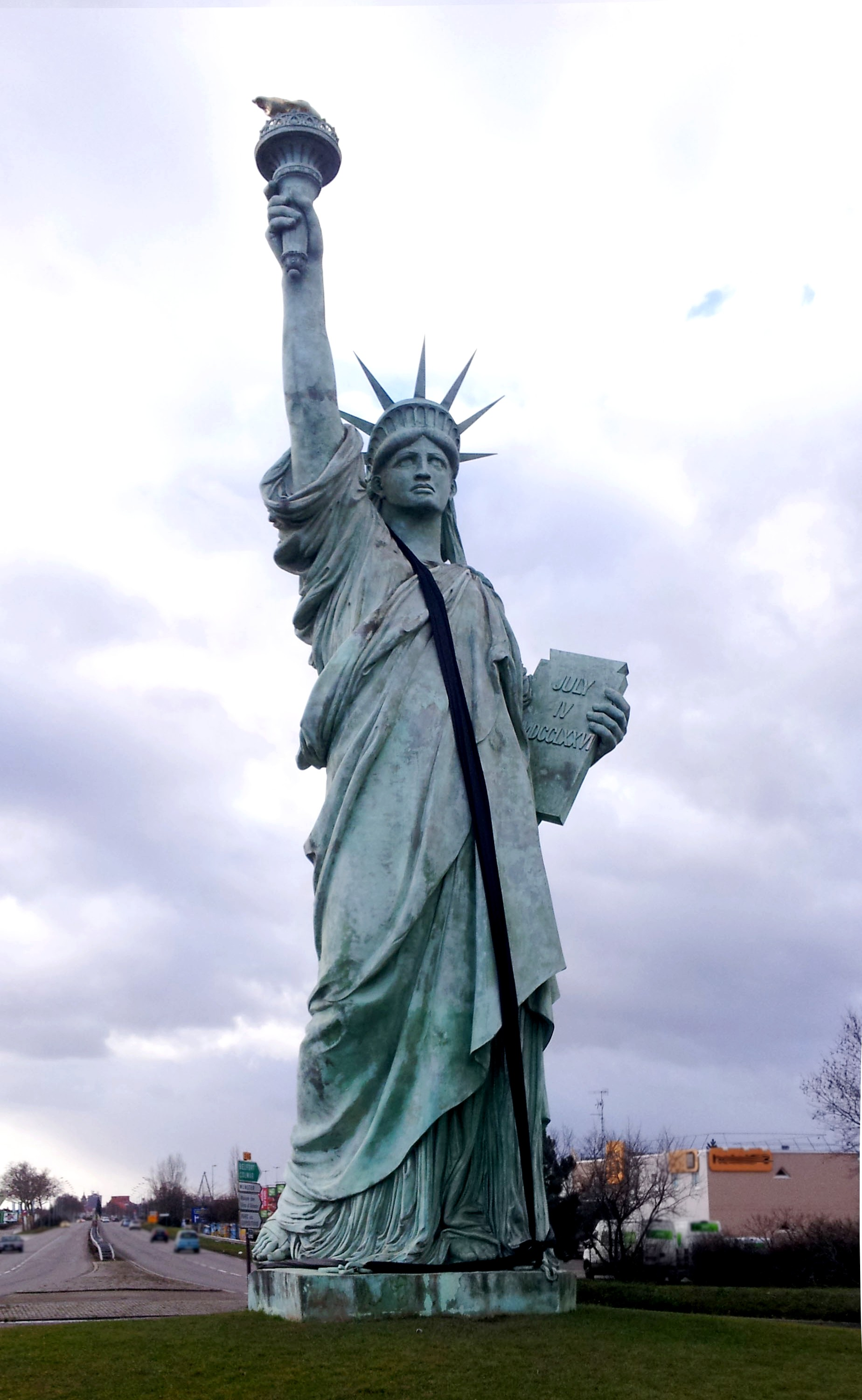 Statue de la liberté, Colmar, portant une écharpe noire en signe de deuil et en hommage aux victimes de l'attentat contre Charlie Hebdo, pour la liberté d'expression de la presse